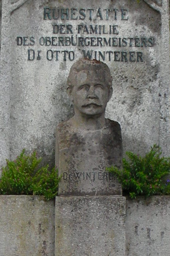 Grab von Otto Winterer auf dem Freiburger Hauptfriedhof. Otto Winterer's grave at the Freiburg cemetery.